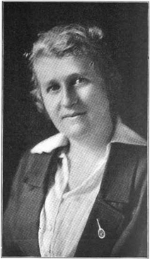 Fotografía de Alice Armand Ugón Rivoir (1887-1992), médica pediatra uruguaya. Aparecida en el libro '"Women Doctors of the World," The Woman Citizen (September 27, 1919): 421.' This file was derived from: AliceArmandUgon1919.tif